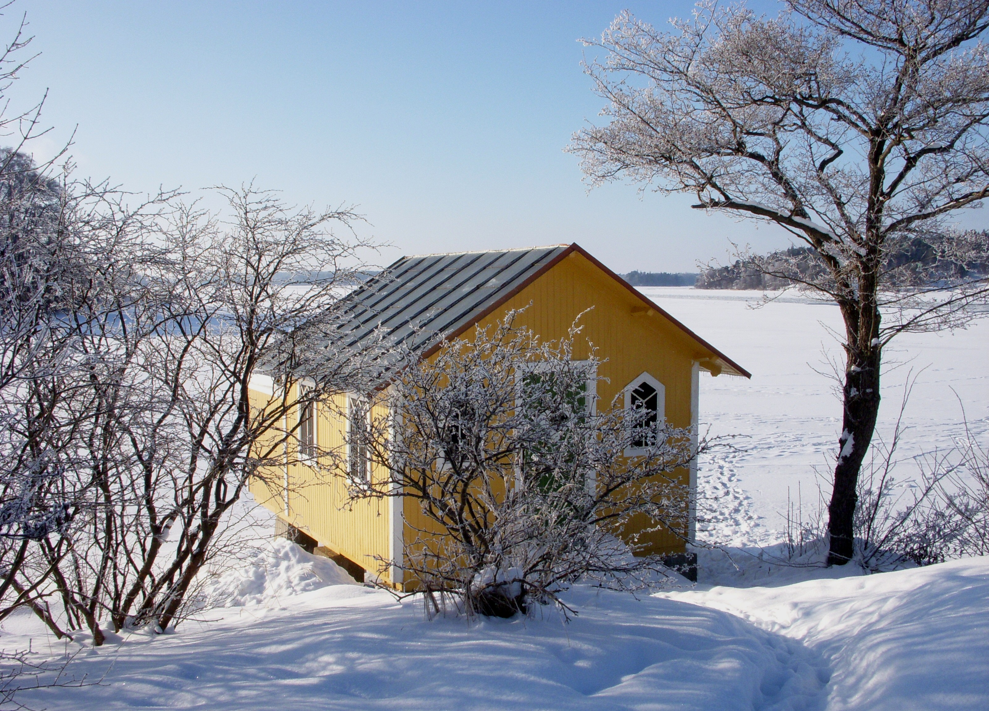 Kallbadhus med badsump på Lindholmen (Mälaren), vintern 2010